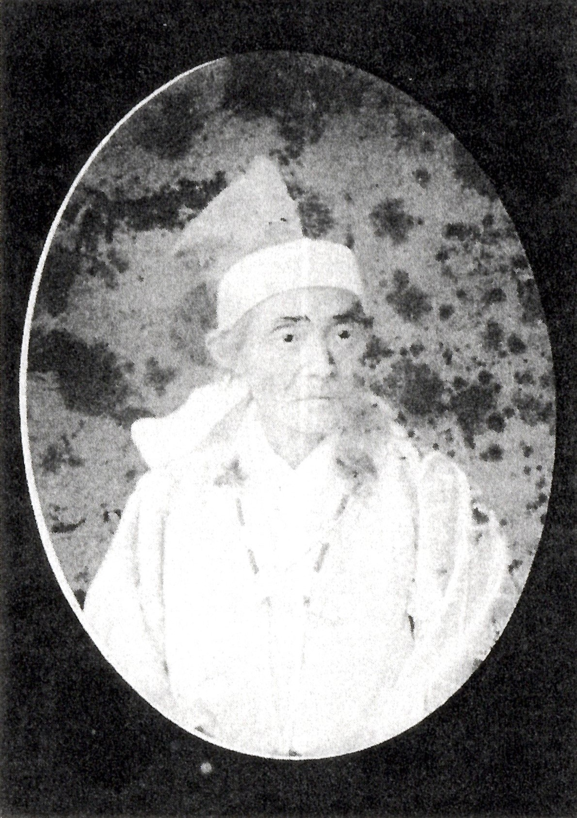 松平(吉井)信発の肖像写真。